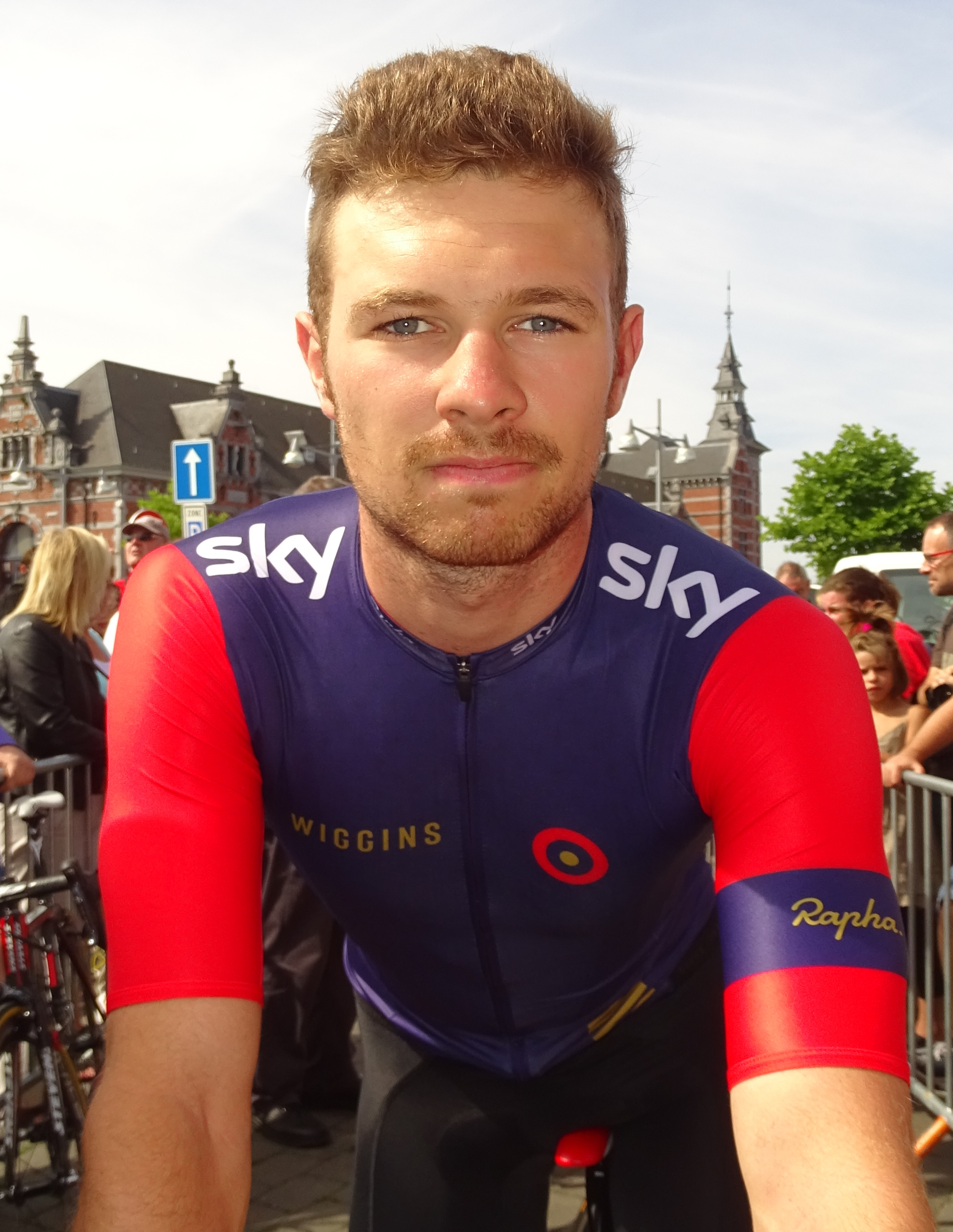 Reportage réalisé le mercredi 22 juillet à l'occasion du départ du Grand Prix Pino Cerami 2015 à Saint-Ghislain, Belgique.